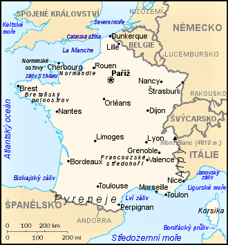 Orientační mapa Francie.